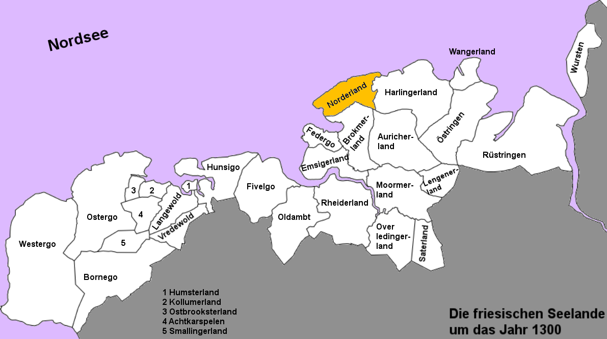 Karte der freien friesischen Seelande (Landesgemeinden) von der Zuiderzee bis zur Weser in den Grenzen um das Jahr 1300, das Nordnerland hervorgehoben. (Karte ohne Inseln.)